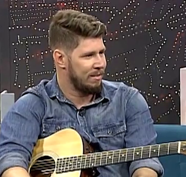 David Cerqueira na Rede Boas Novas, 2017.